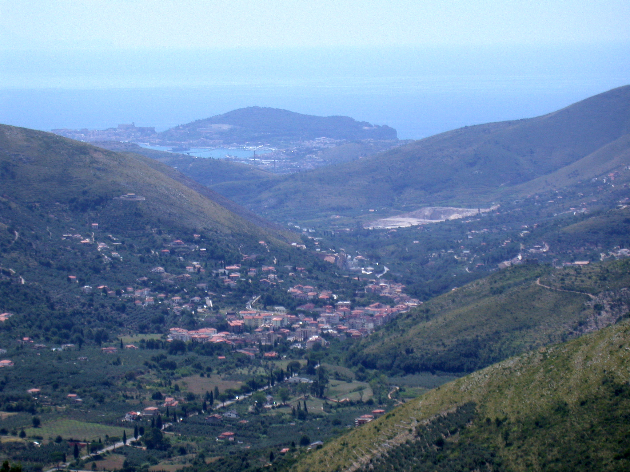 Itri, provincia di Latina, Lazio, Italia. Panorama dal santuario della Madonna della Civita (monte Civita)